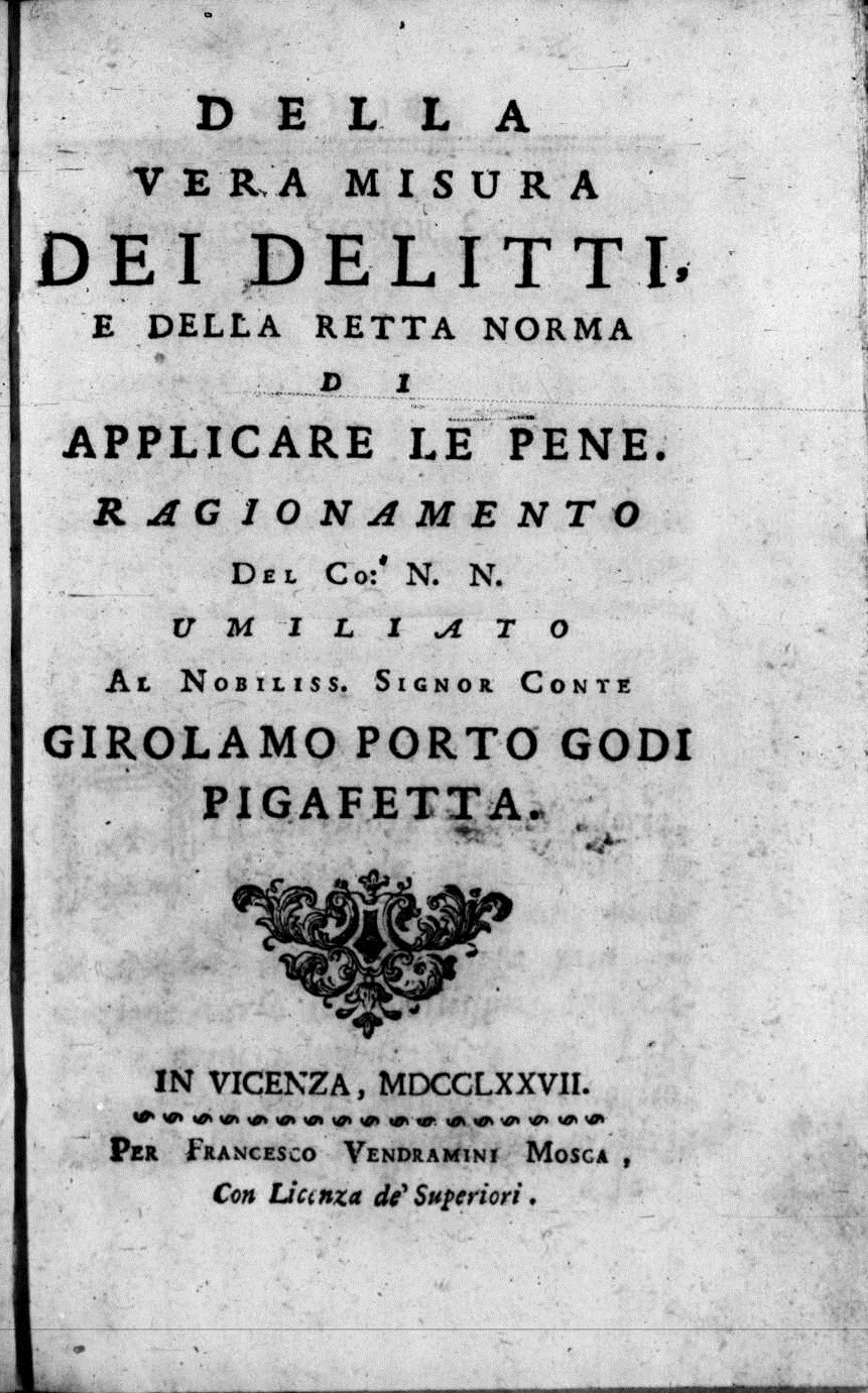 Frontespizio